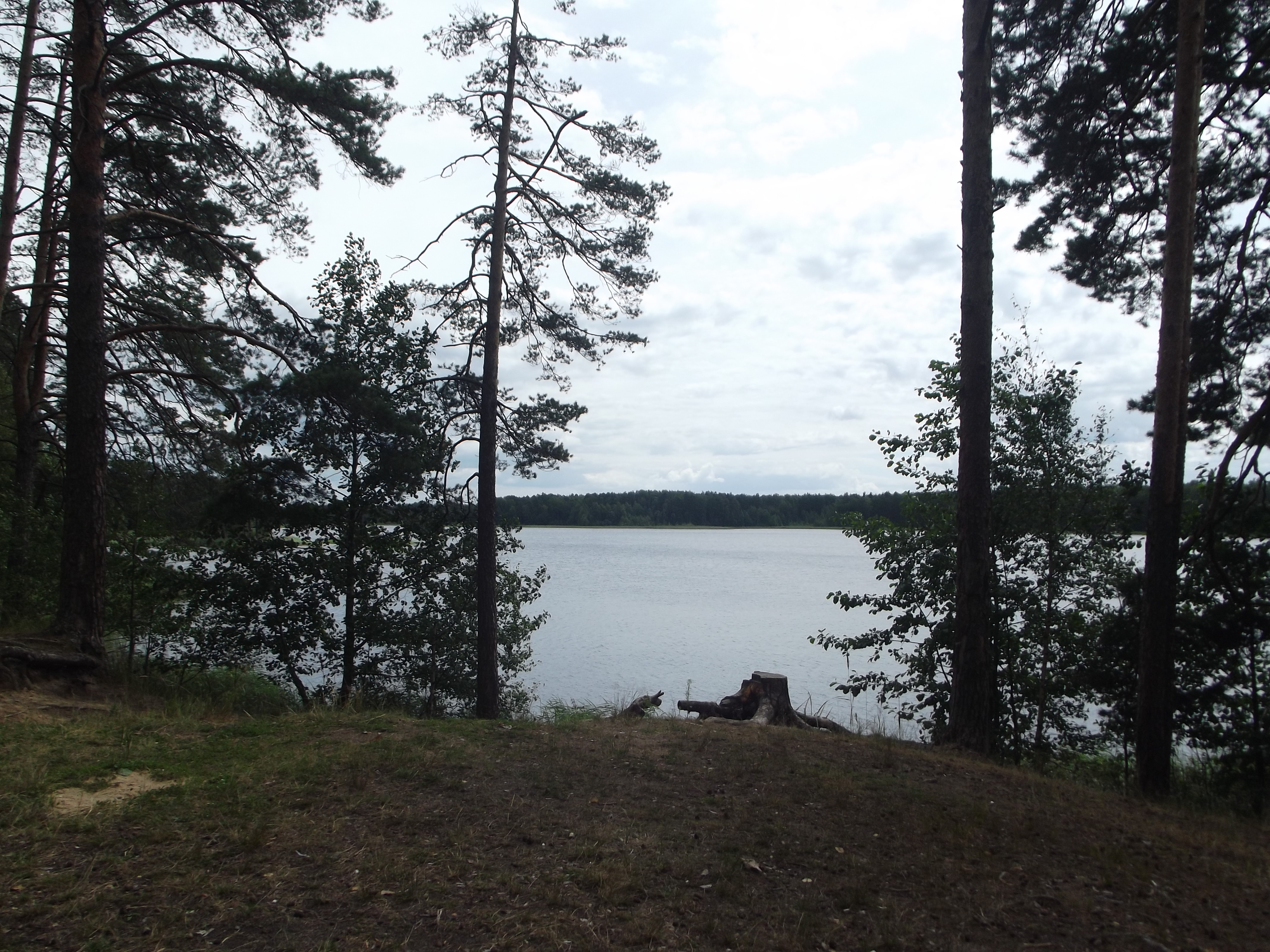 Большое Святое озеро, Нижегородская область. Координаты озера (но не точки съёмки): 55° 38′ 45″ с. ш., 42° 18′ 42″ в. д. This image is related to the protected area of Russia number 5210368